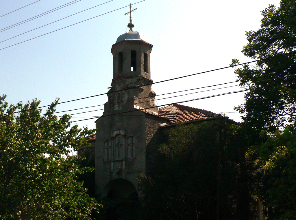 Църква "Вознесение Господне", с. Първомайци